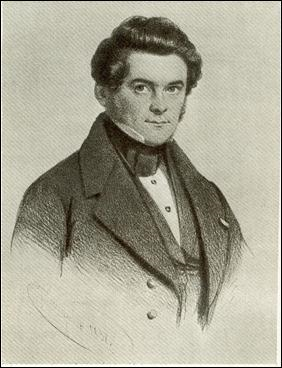 Édouard d'Huart, ministre belge